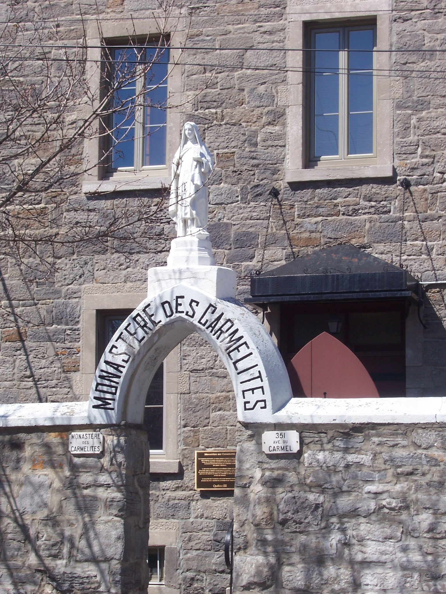 Entrée principale du Carmel de Montréal